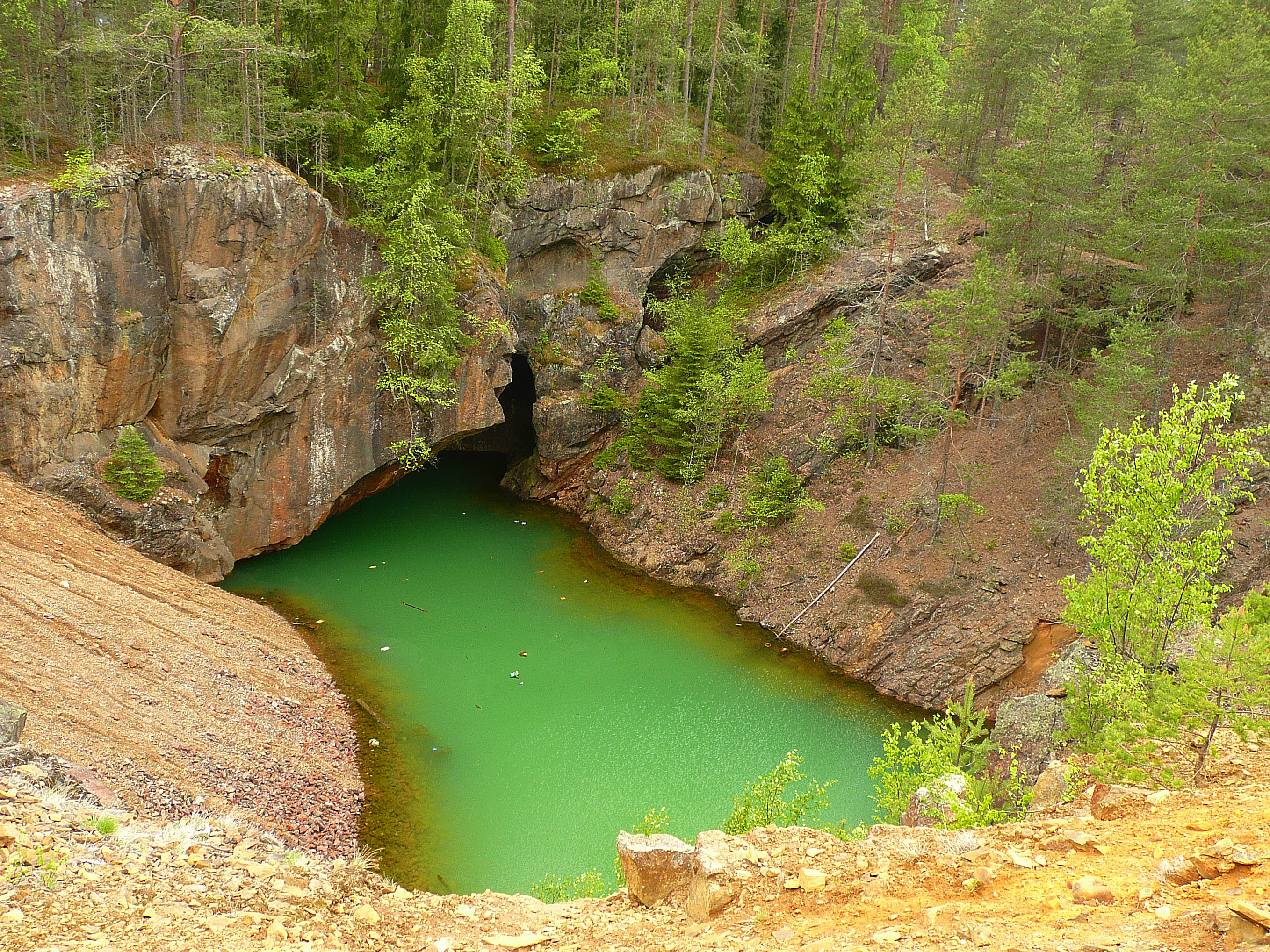 "Ljusnarsberg gruva" copper mine - Kopparberg - Ljusnarsberg (Sweden)